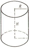 Наглядное пособие по вычислению объема цилиндра.